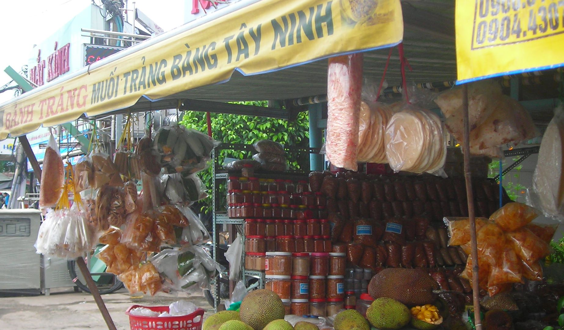 Étale de galettes de riz, spécialités de Trảng Bàng - Tây Ninh